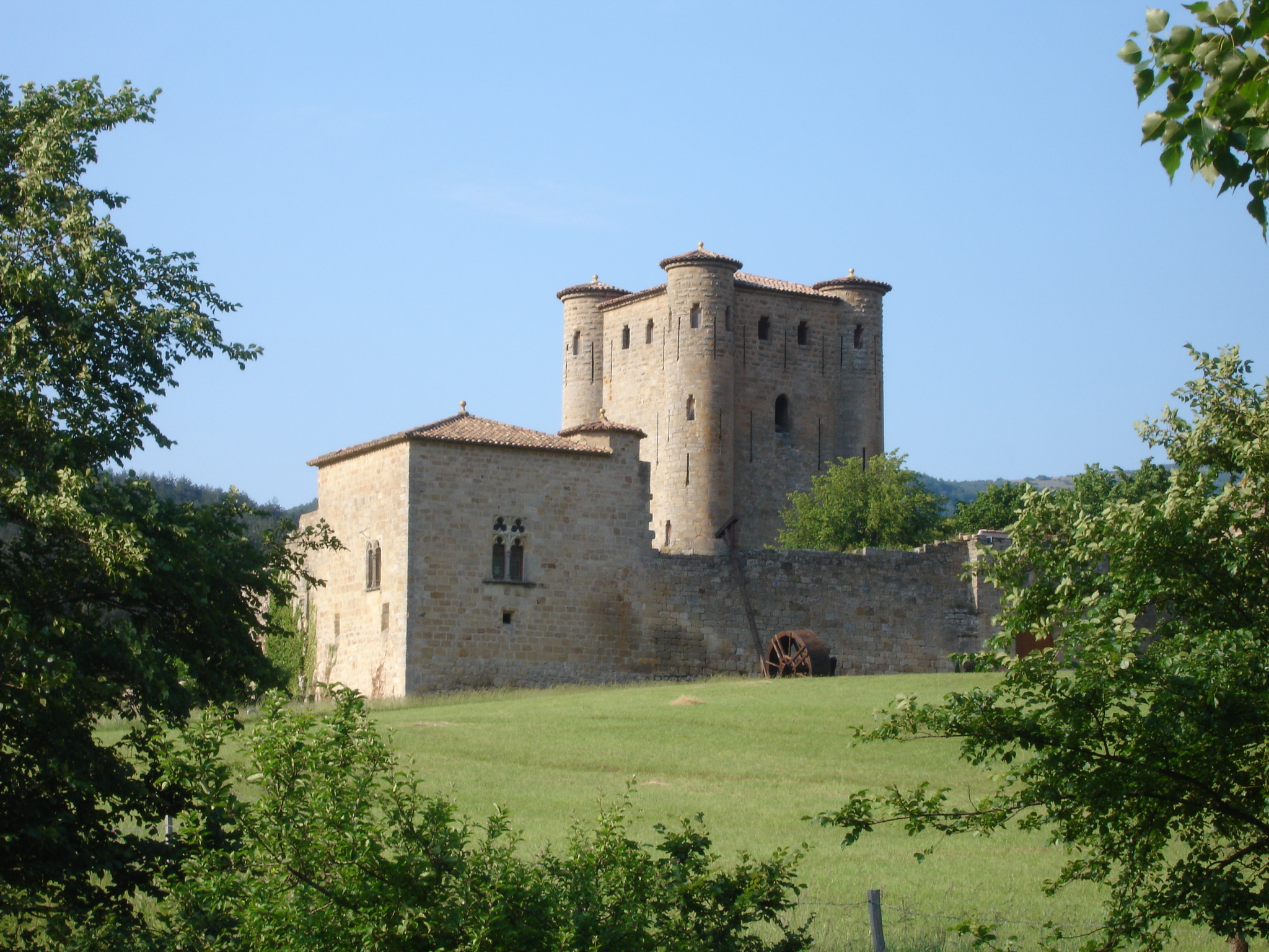 France, Aude, Château d'Arques